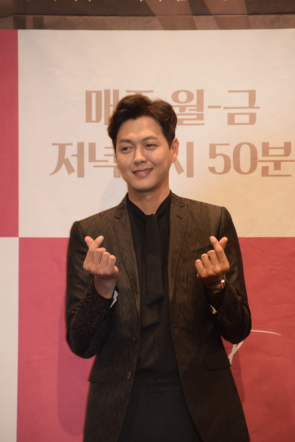 KBS 드라마 '우아한 모녀' 제작발표회 현장 (2019.10.31)